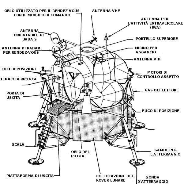 Schema dei principali componenti del LEM Fonte: Immagine NASA